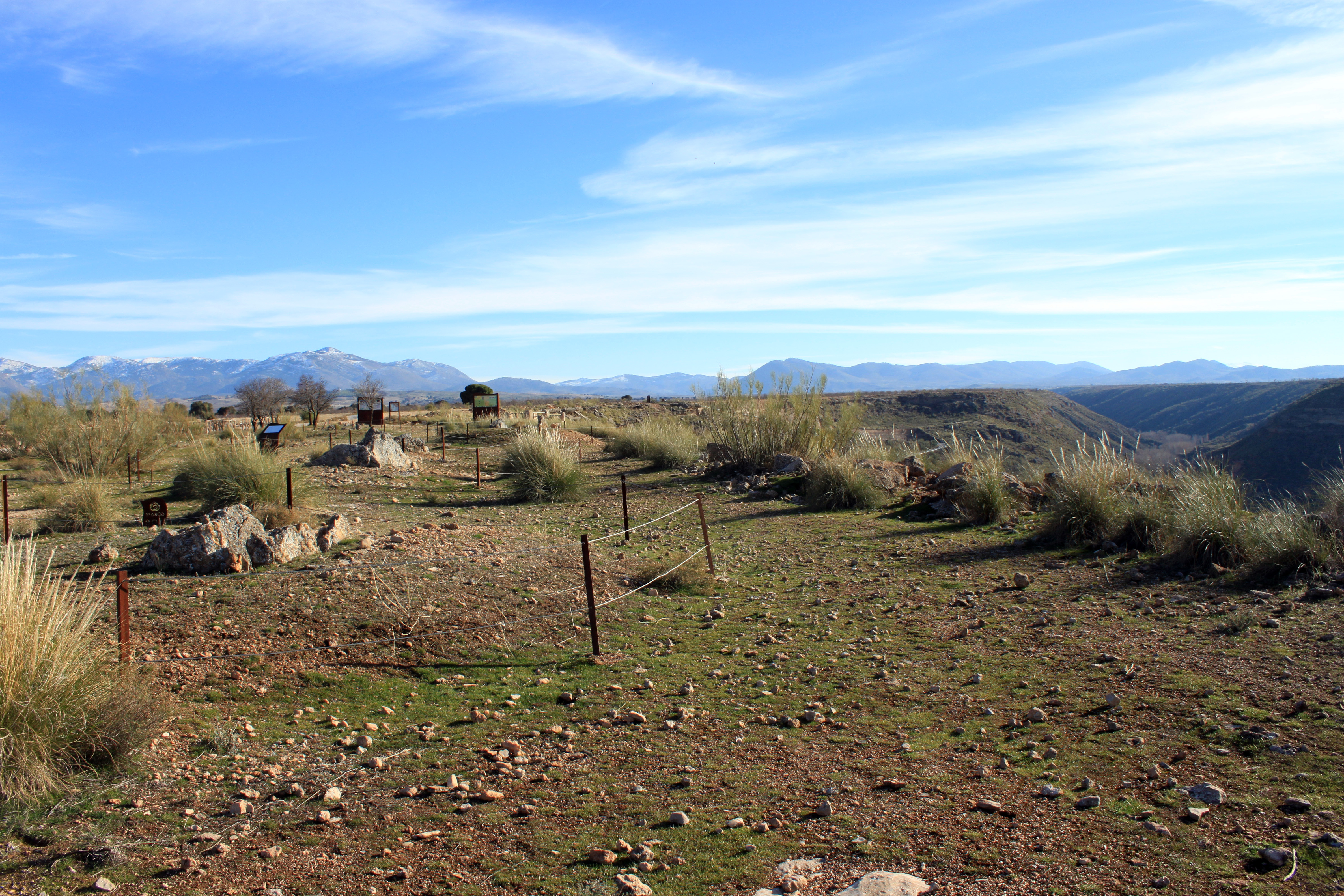 Paraje del Llano de Olivares en Gorafe, provincia de Granada, Andalucía, España.